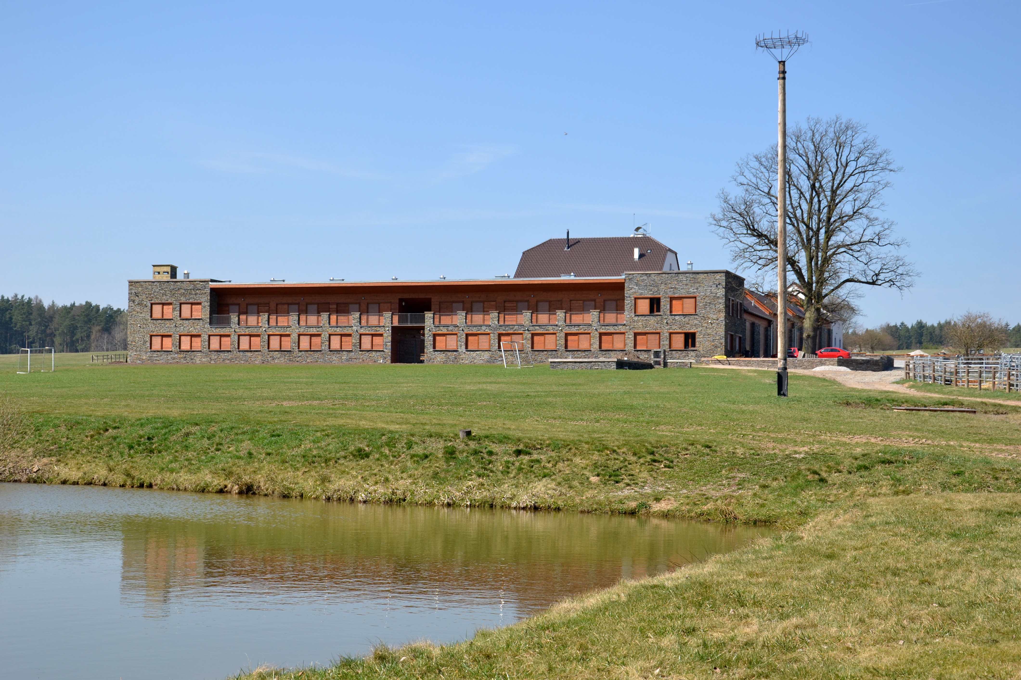 Strachovice – opravený dvůr